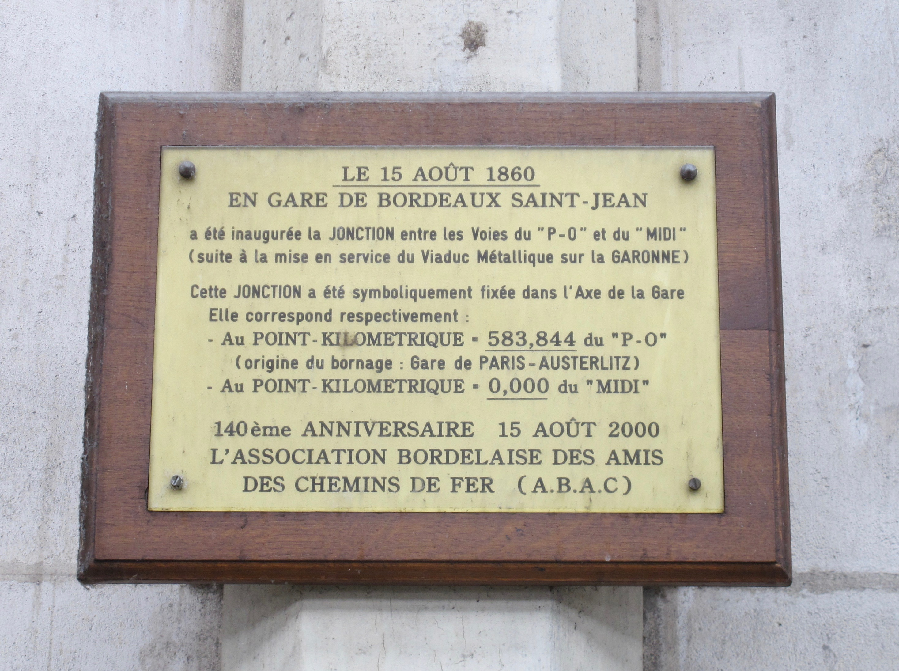 Plaque gare de Bordeaux-Saint-Jean (quai 1), en hommage au raccordement des gares PO et Midi en 1860.